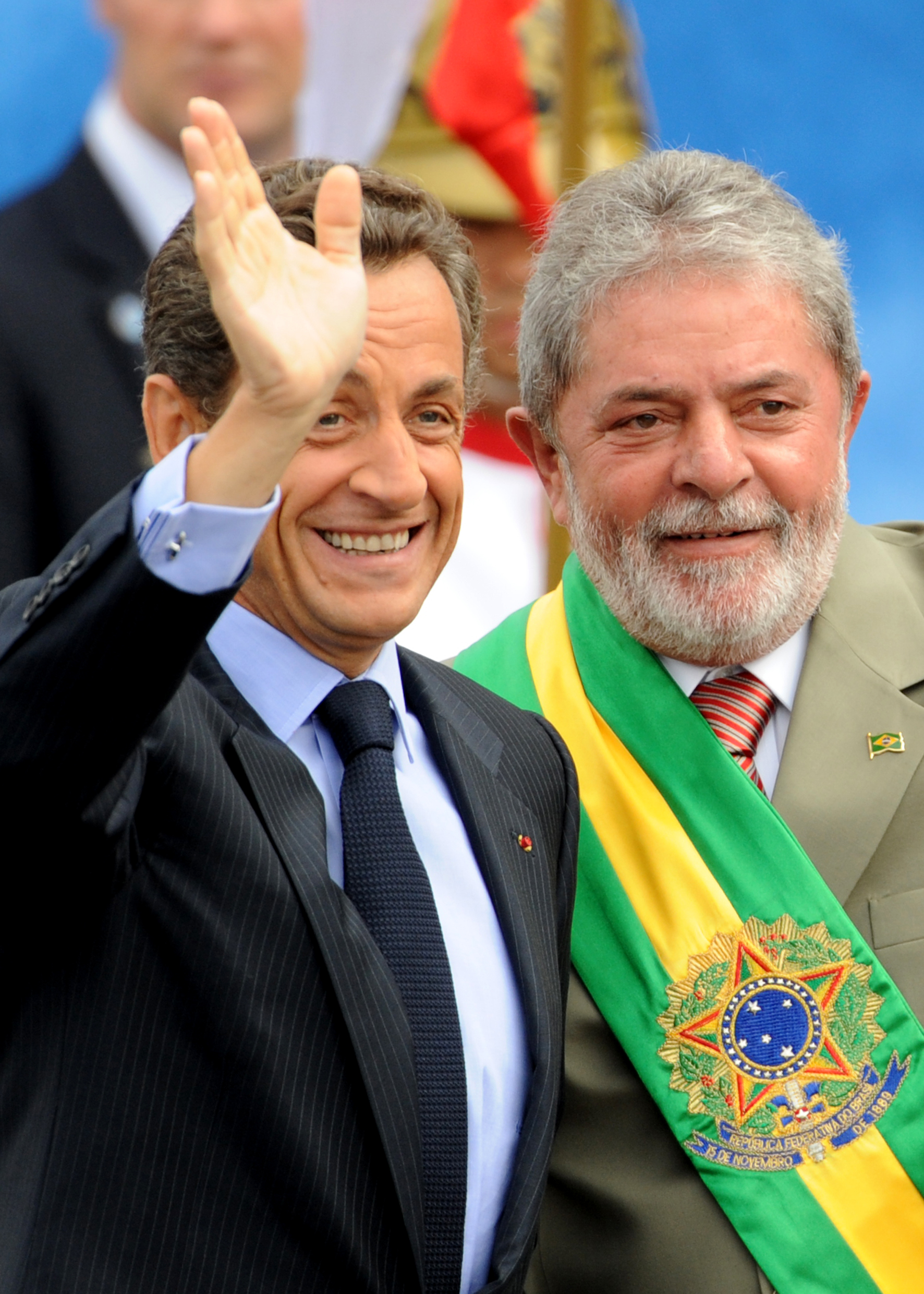 Os presidentes Nicolas Sarkozy, da França, e Luiz Inácio Lula da Silva acenam para populares antes do desfile de 7 de Setembro na Esplanada dos Ministérios